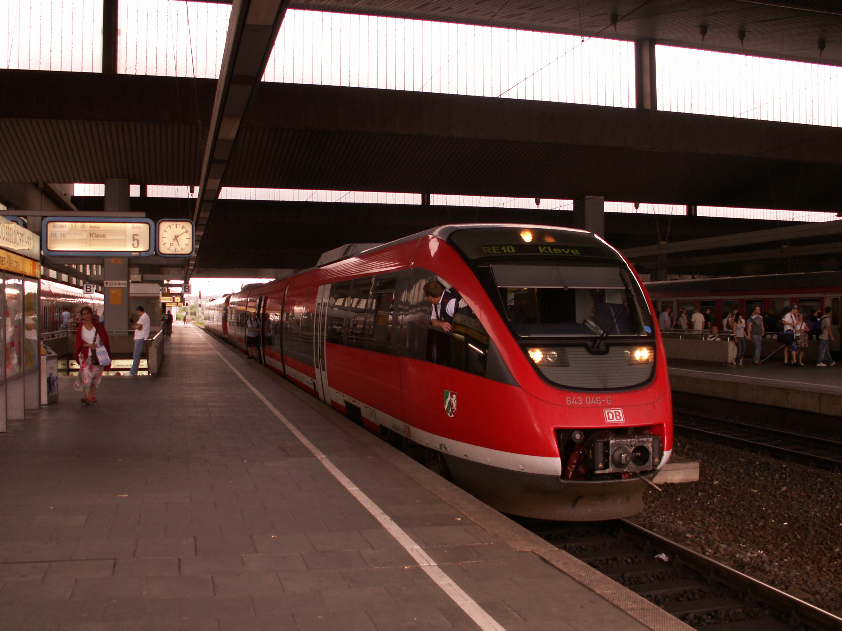 Niersbahn